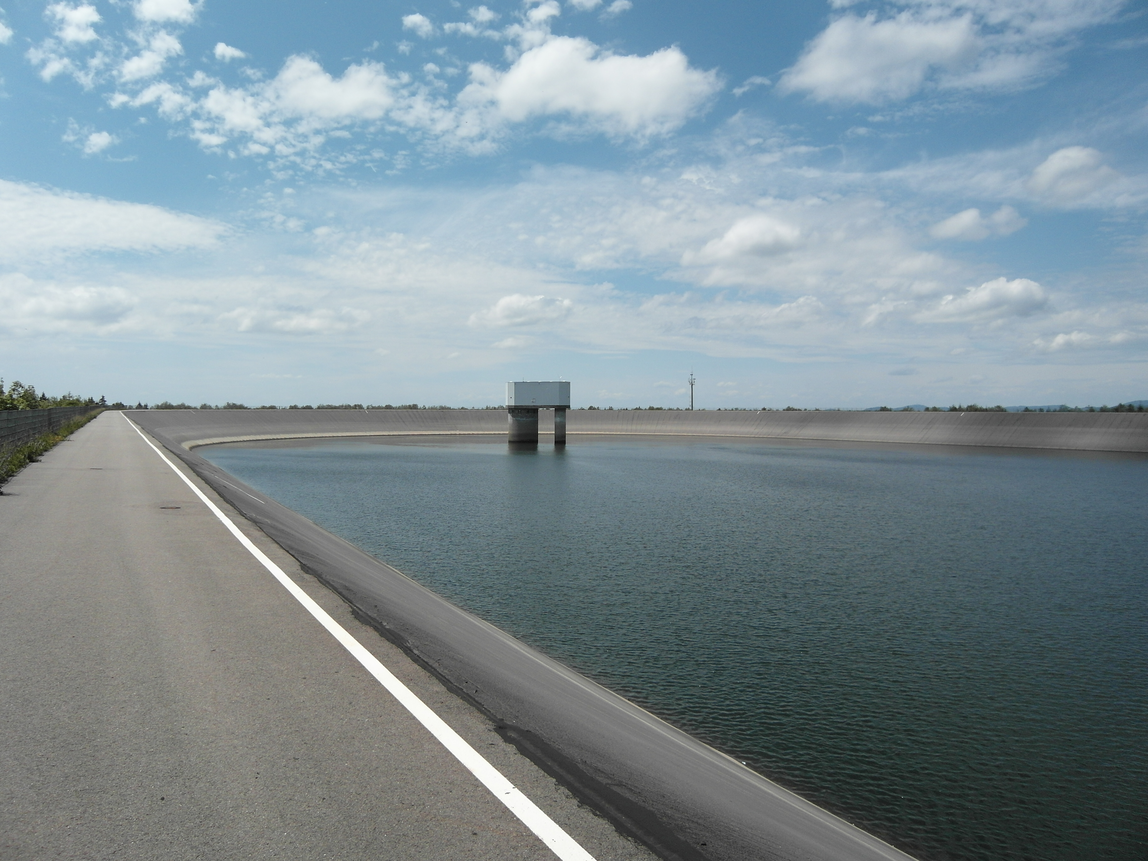 Pumpspeicherkraftwerk Wehr: Oberbecken (Hornberg) des PSW Wehr.